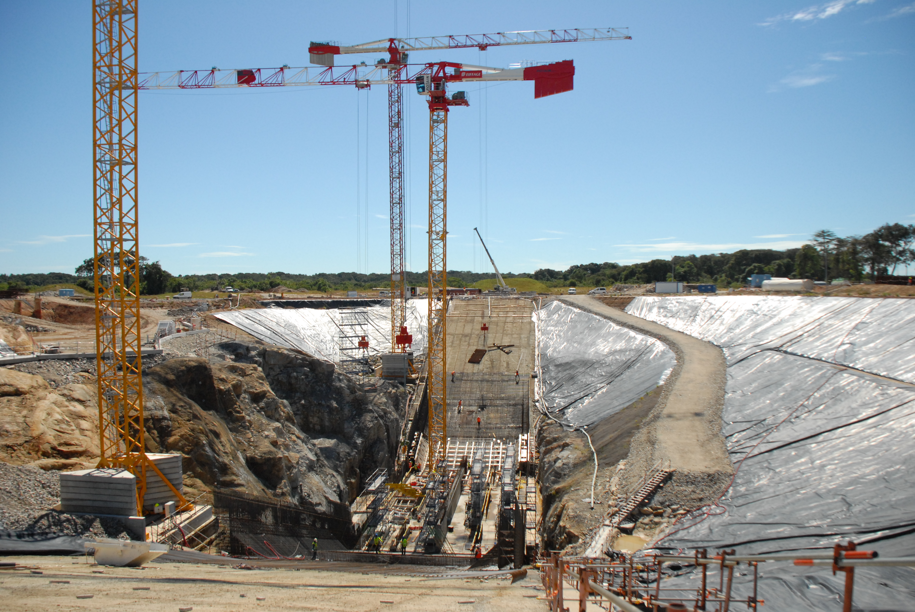 Chantier du pas de tir pour la fusée Ariane 6 dans la zone Ensemble de Lancement (ELA) 4, au Centre spatial guyanais à Kourou.